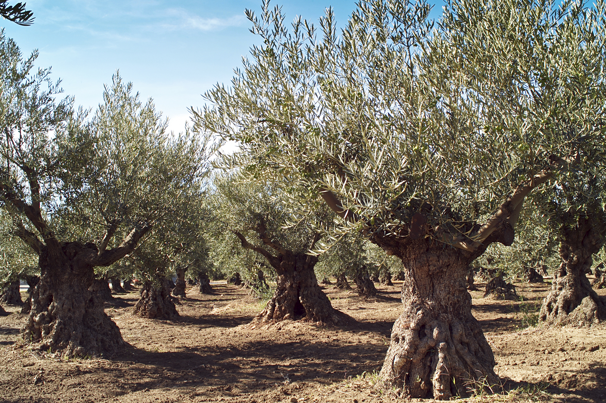 INRA, Jean Weber